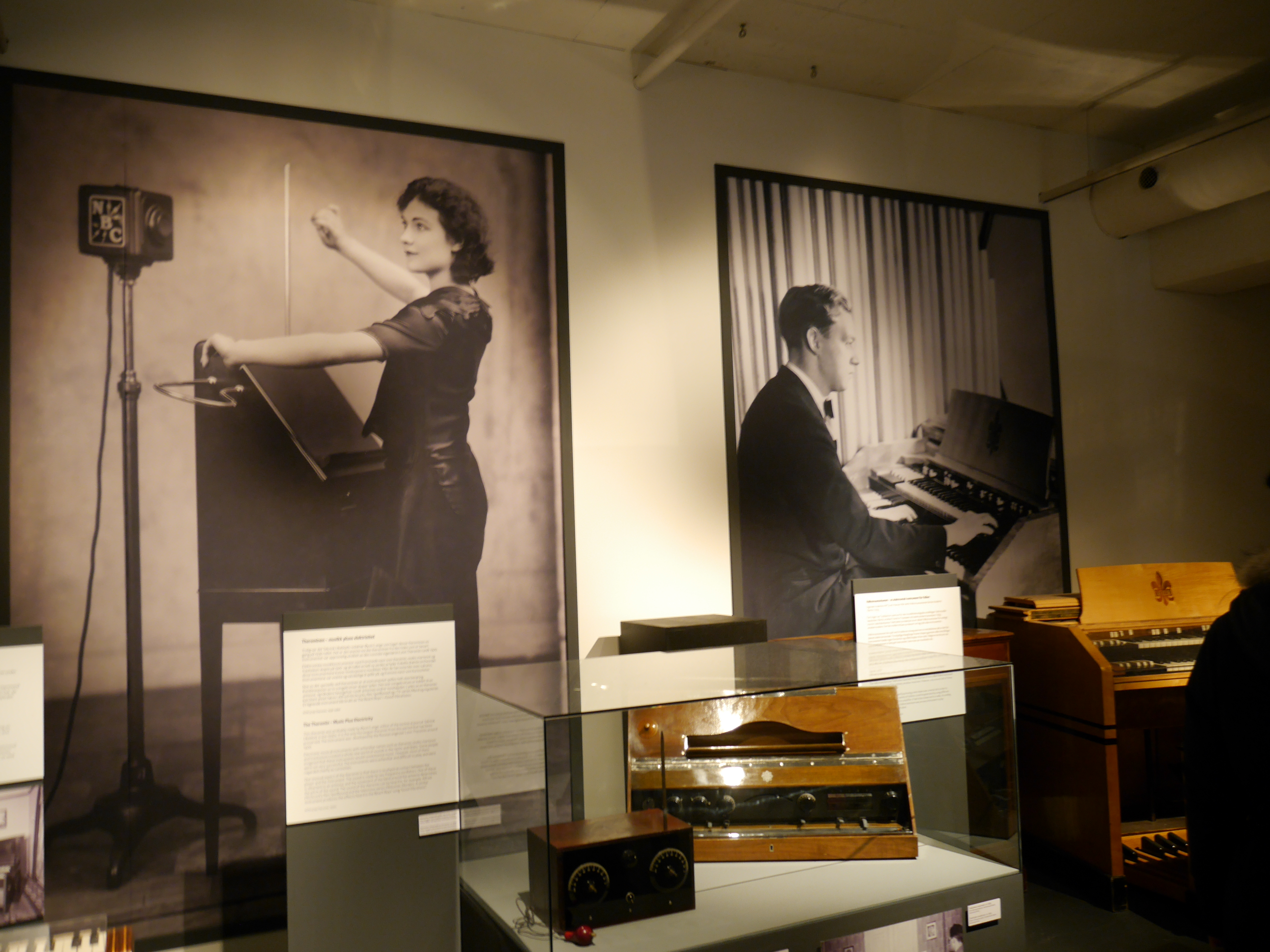 Theremin by Øivind Lange, Oslo (1930s), Telefunken Volkstrautonium Ela. T42 (c.1933), Hammond BC organ (1938) - Norsk Teknisk Museum.jpg References Thereminapparat muligens tilh. ing. Øivind Lange, Oslo (in Norwegian). DigitaltMuseum.no. Volkstrautonium, Type Ela. T42, fra ca. 1933, Nr. 342 (in Norwegian). DigitaltMuseum.no. "Etterklang". Bulletin 2007 (2): 10. Norsk Teknisk Museum. "Trautonium fra 1933. ... Theremin fra 1930-tallet." 29. nov: Konsert med Hammondorgel (in Norwegian). Norsk Teknisk Museum. "Hammond BC LaFleur, 1938 -- Orgelet som benyttes under konserten er en Hammond BC LaFleur-modell fra 1938. Det ble kjøpt inn av restaurant Regnbuen i Klingenberggata i Oslo, og var i bruk der til midten av 1960-tallet. Instrumentet er til daglig en del av utstillingen ”Musikkmaskiner” ved Teknisk Museum. Det er utlånt av Tom Erik Ingvaldsen." Hammond modell E, fra 1938, Serienr. 8037 (in Norwegian). DigitaltMuseum.no. Hammond BC Lafleur, fra 1938 med tonekabinett, Serienr. 1000 (in Norwegian). DigitaltMuseum.no. "Produksjon: 1938 / Produsent, sikker: Boosey & Hawkes / Produksjonssted / Eksponeringssted (F), sikker: Storbritannia, England, London / Bruk: antatt"